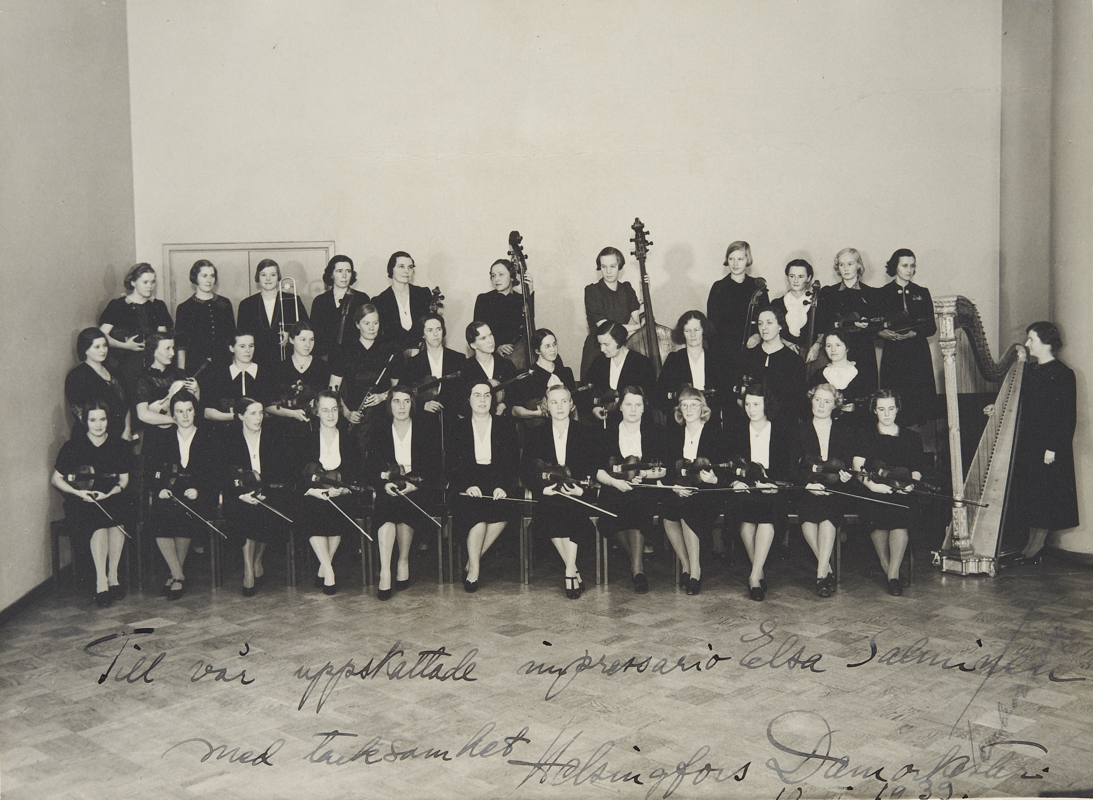 Helsingin Naisorkesteri, kapellimestarina orkesterin perustaja Heidi Sundblad-Halme; eturivissä kuudentena vasemmalta Helsingin Naisorkesterin vuonna 1938 perustanut säveltäjä, kapellimestari Heidi Sundblad-Halme. vaaka, mustavalkoinen, kiinnitetty kartongille, jonka koko 21 x 30cm